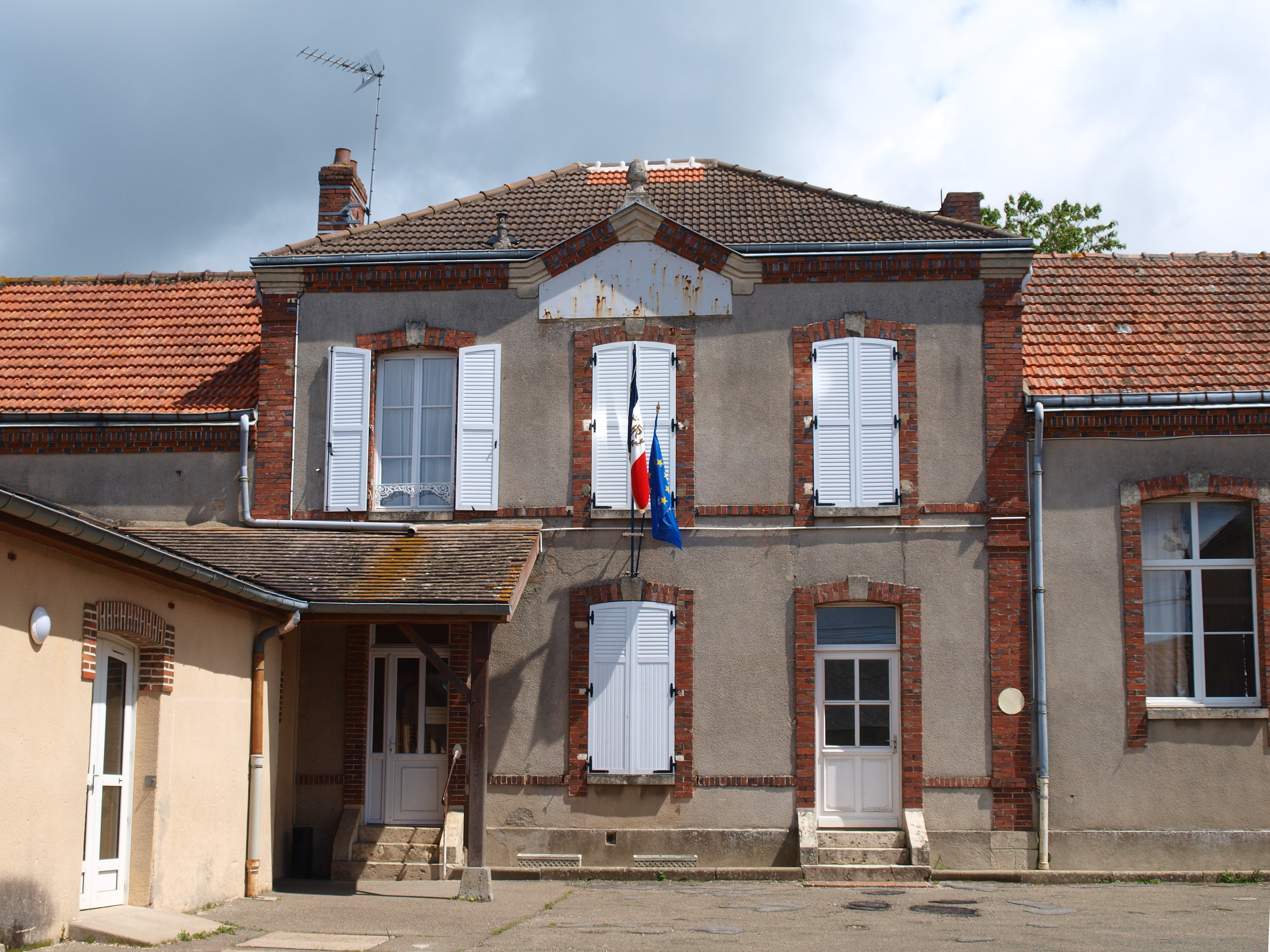 Maisons (Eure-et-Loir)